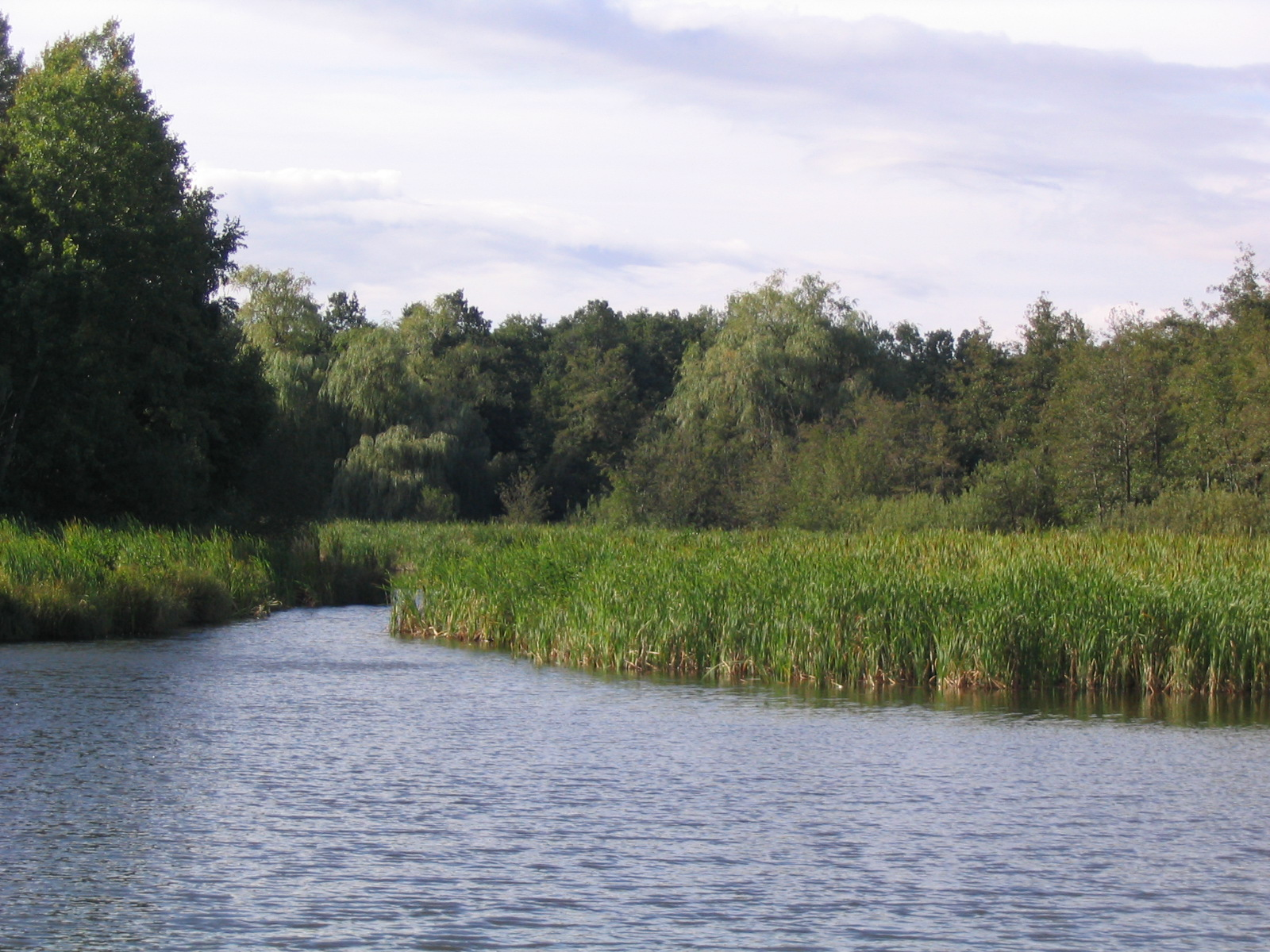 a Mátrafüredi Sástó